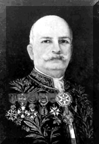 Image of José Maria da Silva Paranhos Júnior, barão do Rio Branco (1845 - 1912), Minister of Foreign Affairs of Brazil from 1902 till 1912.